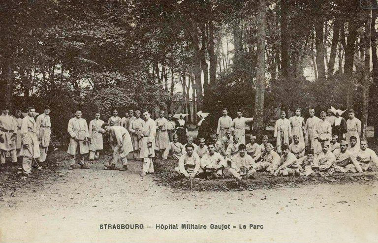 Strasbourg. Hôpital militaire Gaujot - le parc. Bibliothèque nationale et universitaire de Strasbourg